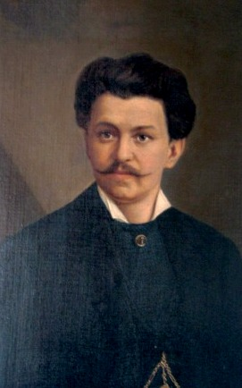 Porträt des Hof-Fotografens Jacob Wothly